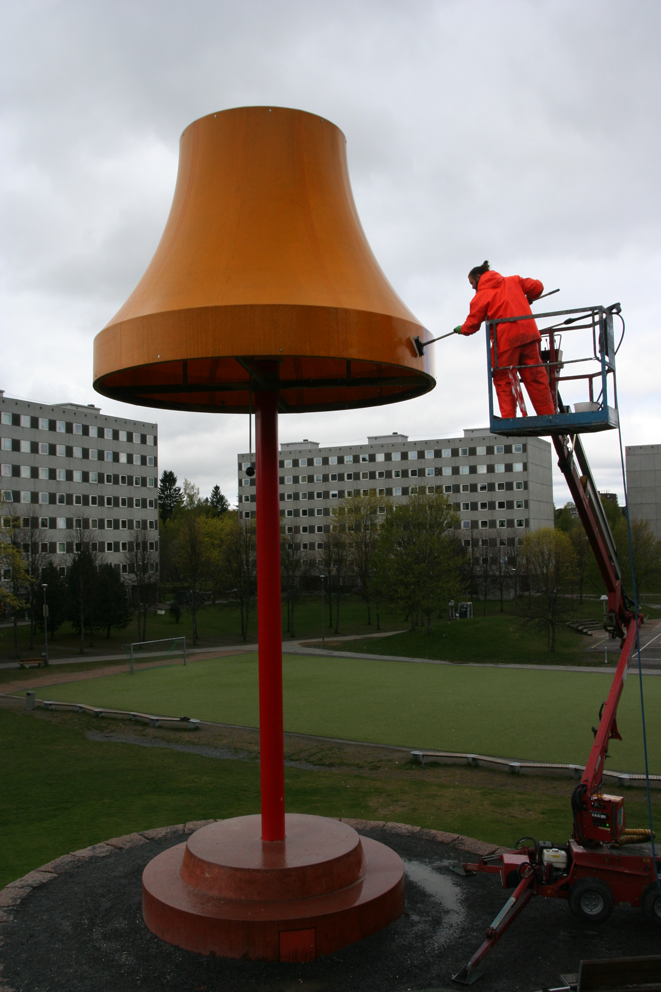 Fredrik og Martin Raddums skulptur «Storstua» rengjøres før sommeren. Haugenstua i Oslo. Oslo kommunes kunstsamling